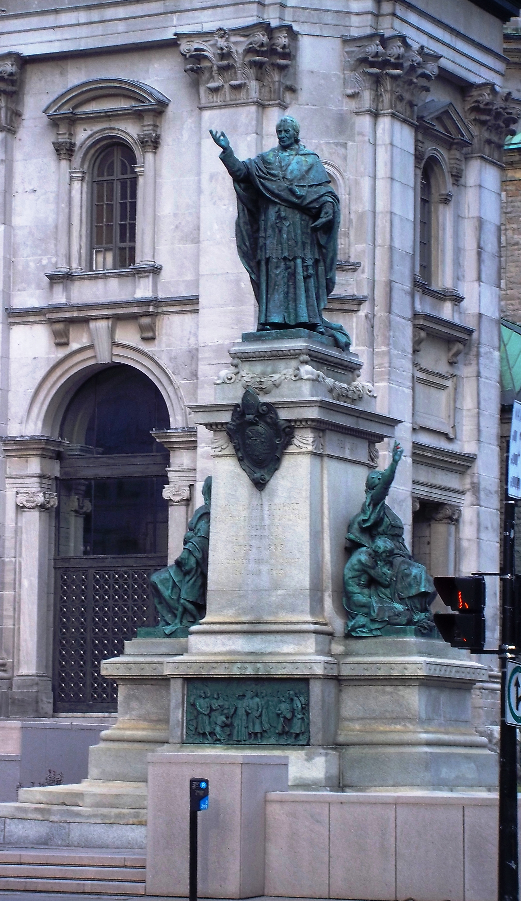 Monument à Ignace Bourget, situé devant la Basilique-cathédrale Marie-Reine-du-Monde, boulevard René-Lévesque Ouest, Montréal